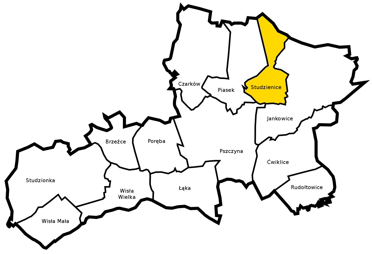 Gmina Pszczyna - sołectwo Studzienice